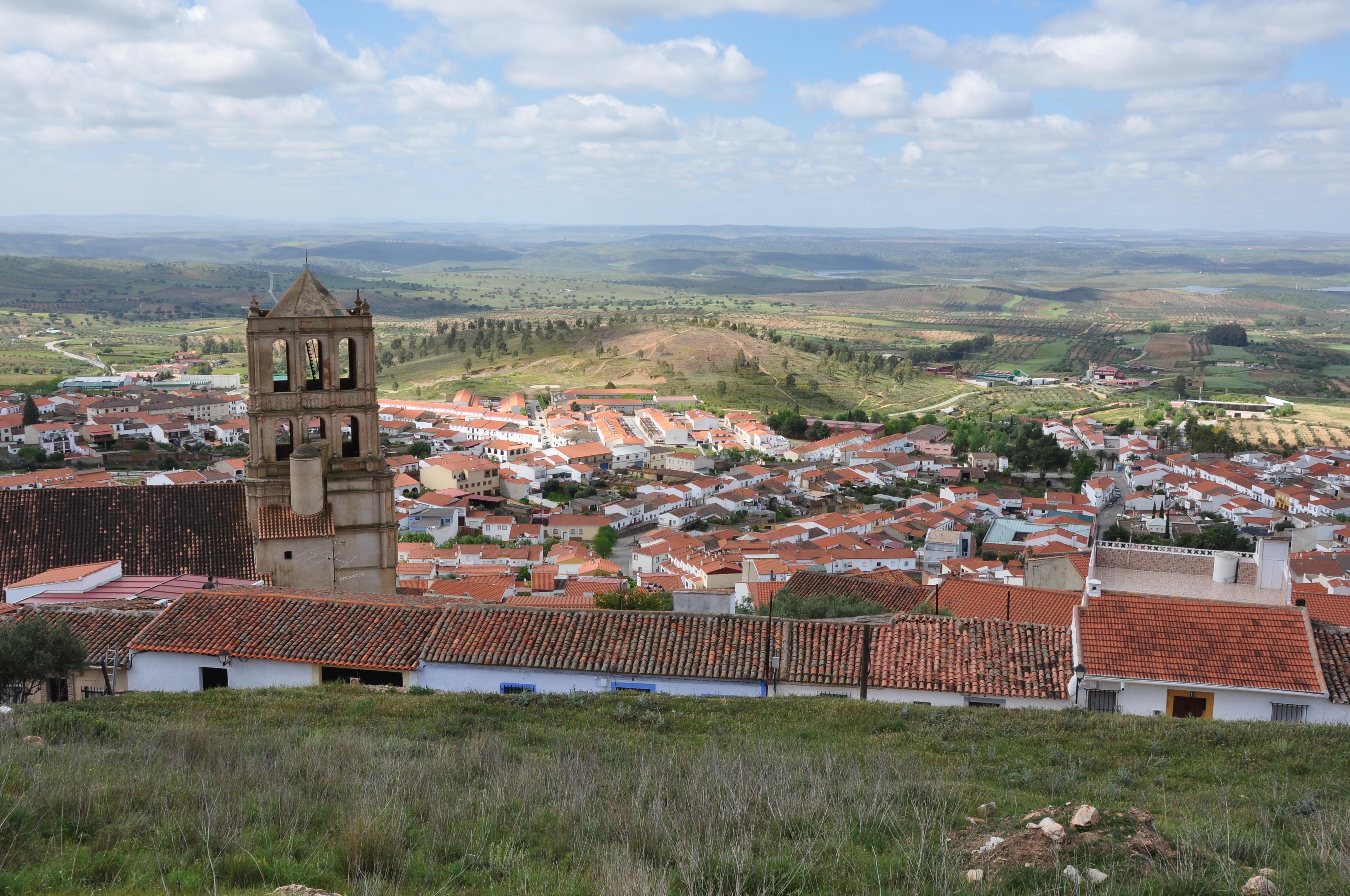 Sierra Grande de Hornachos This is a photography of a Special Area of Conservation in Spain with the ID: ES0000072. Natura2000 entry, EEA entry